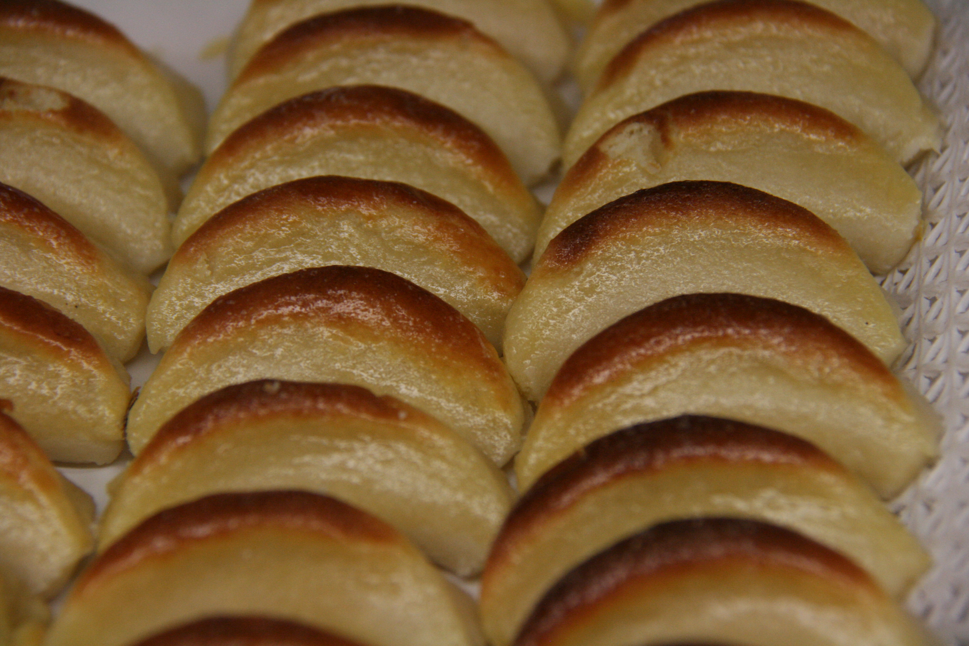 Mazapán